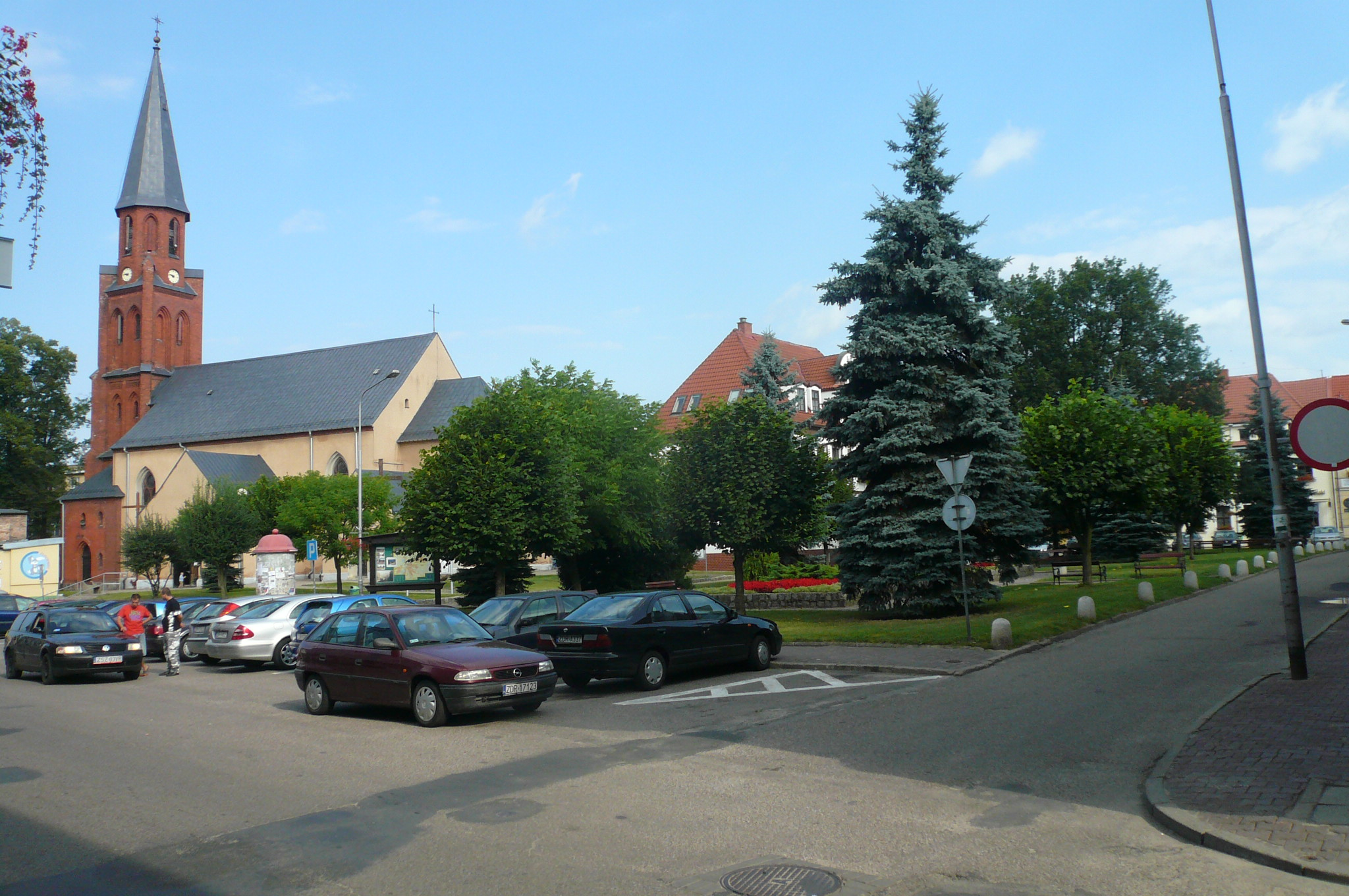 Rynek w Złocieńcu